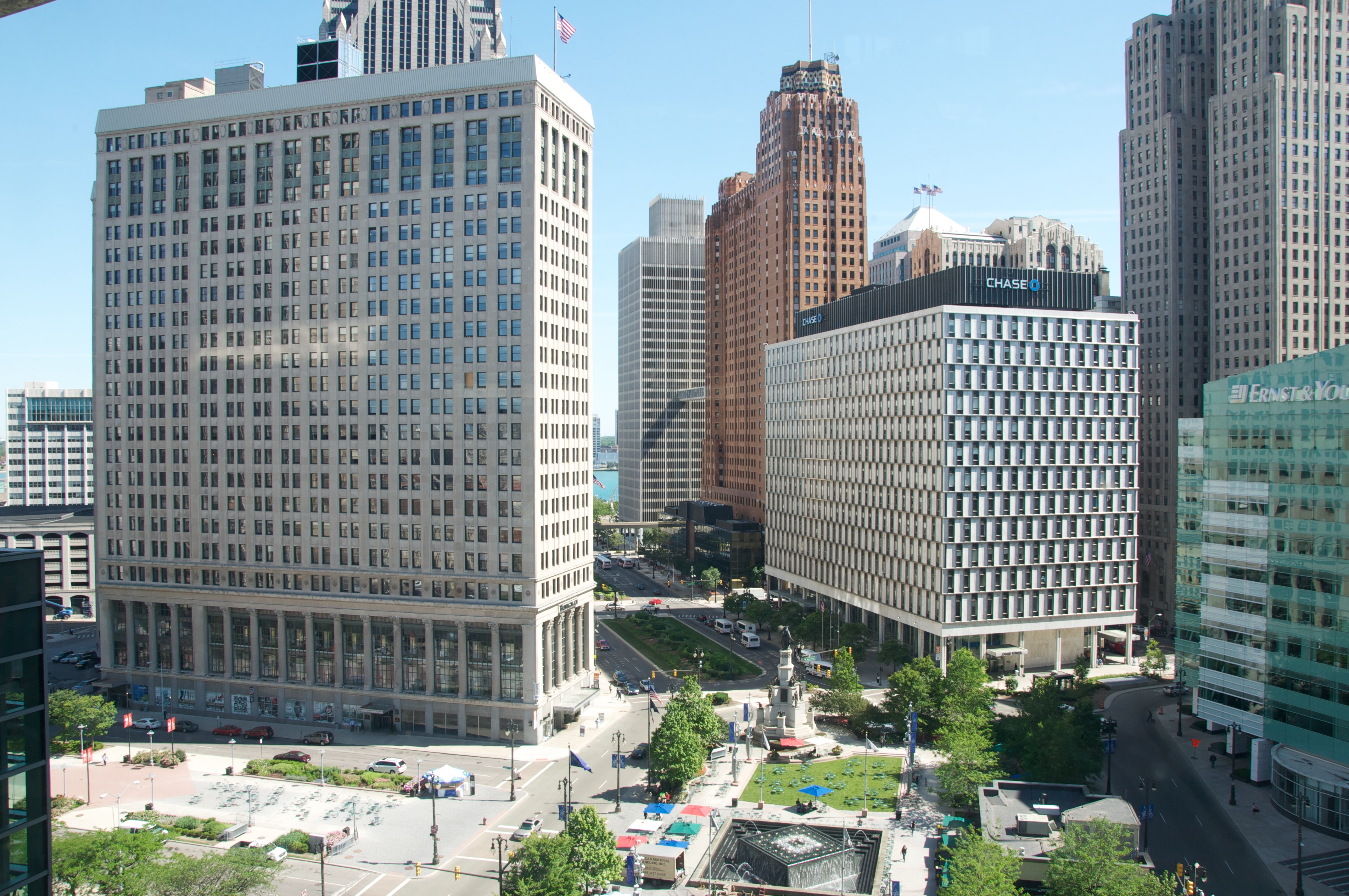 Detroit, MI